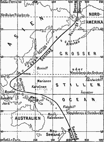 Scheidelinie für Wochentag und Datum